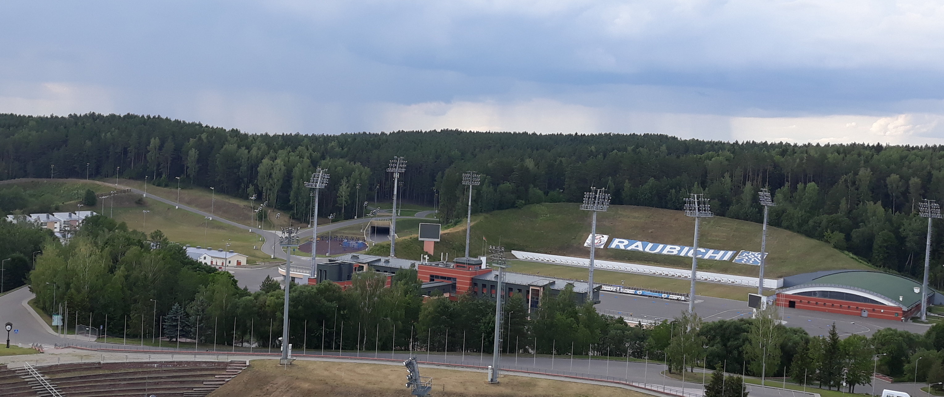 вёска Аколіца. Мінскі раён